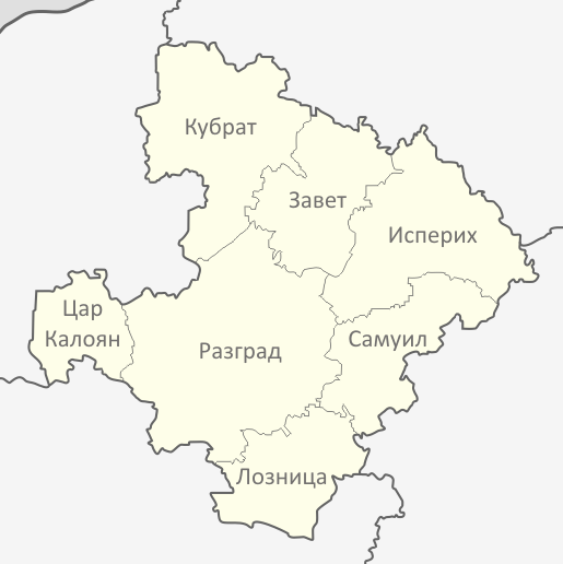 Картата е създадена от Любомир Таушанов